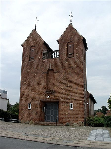 Kolding Immanuelskirken i Danmark. Immanuelskirken